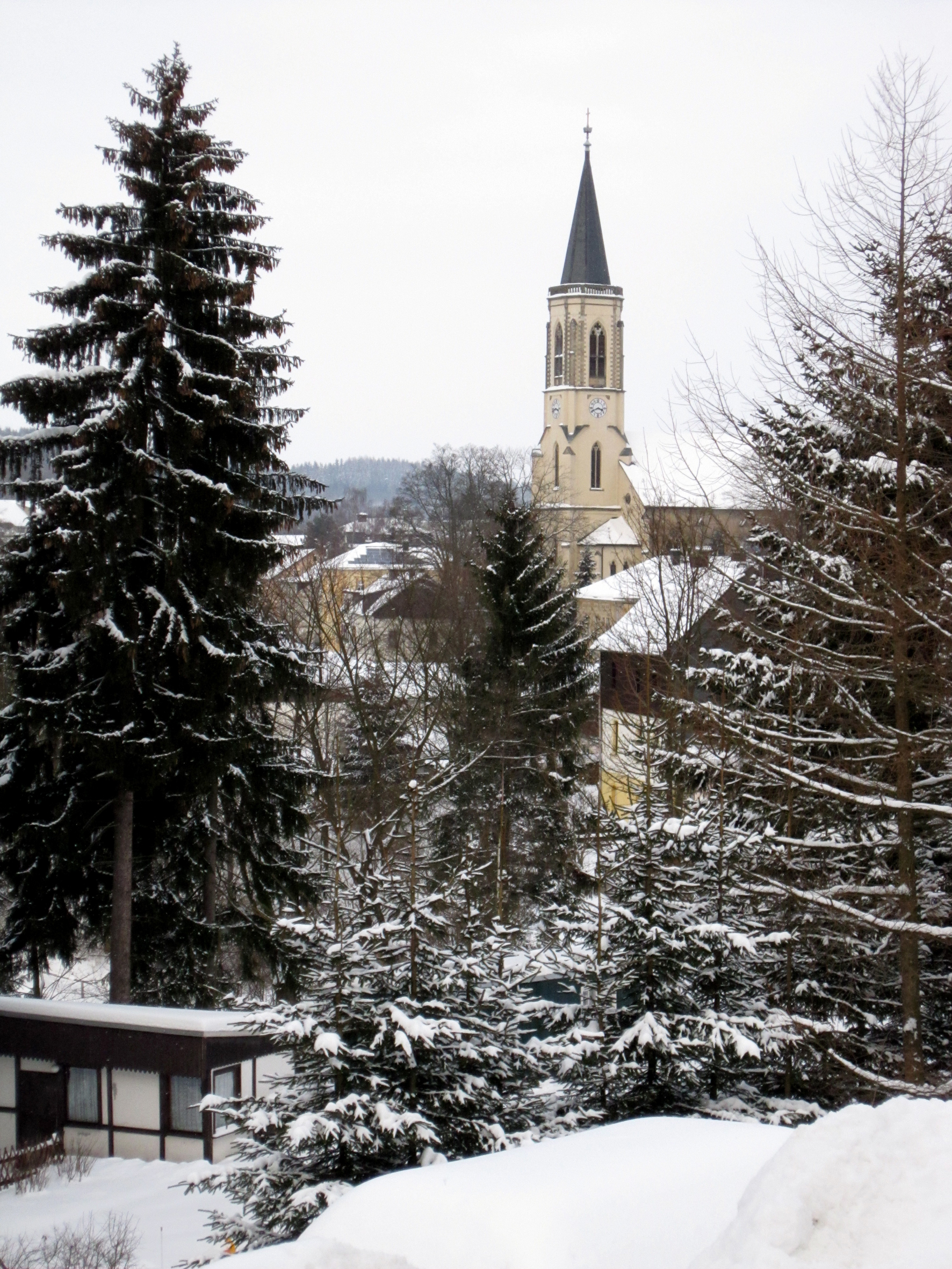 Neuhausen im Erzgebirge Kirche Februar 2010